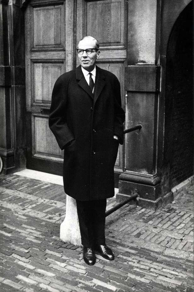 Beerman, A.C.W. (CHU). Minister Beerman wacht buiten, zittend op en paaltje, op de hervatting van een kabinetsoverleg over de kwestie Nieuw-Guinea. Nederland, Den Haag, 22 december 1961.